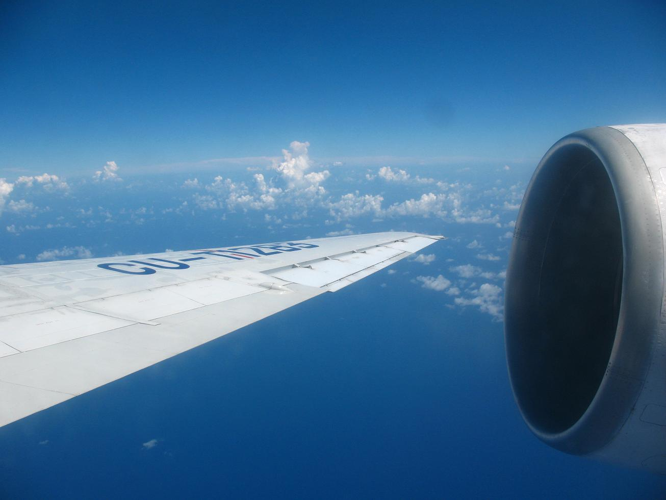 Avión de Cubana en pleno vuelo